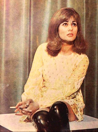 آذر شیوا